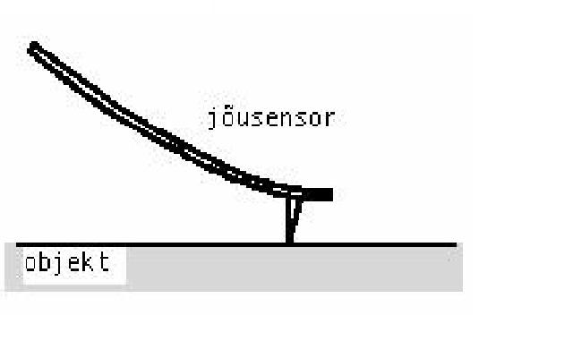 Jõusensori lähendamine objekti pinnale